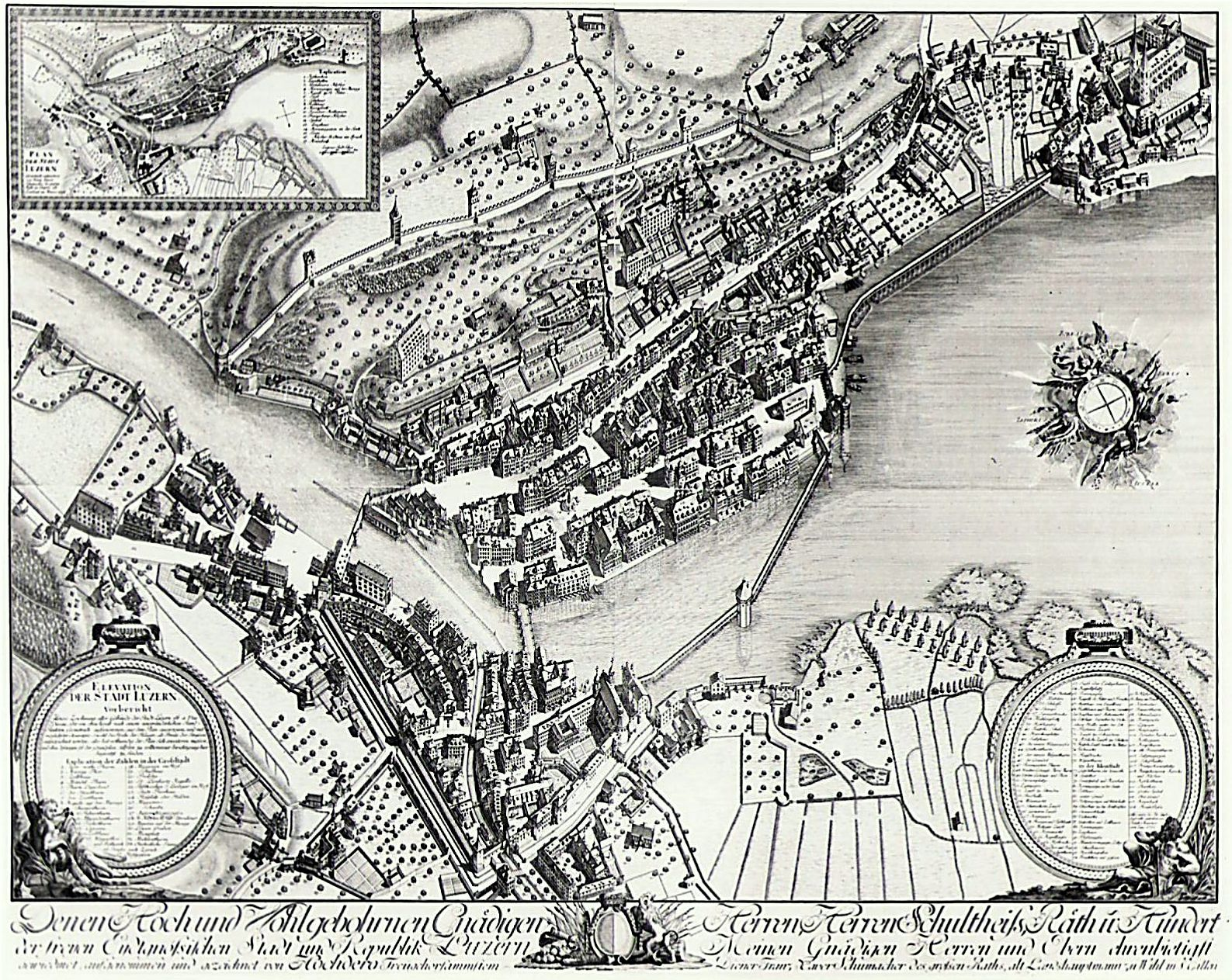 Elevationsplan der Stadt Luzern von 1792 von Franz Xaver de Schumacher nach einem Exemplar in Privatbesitz